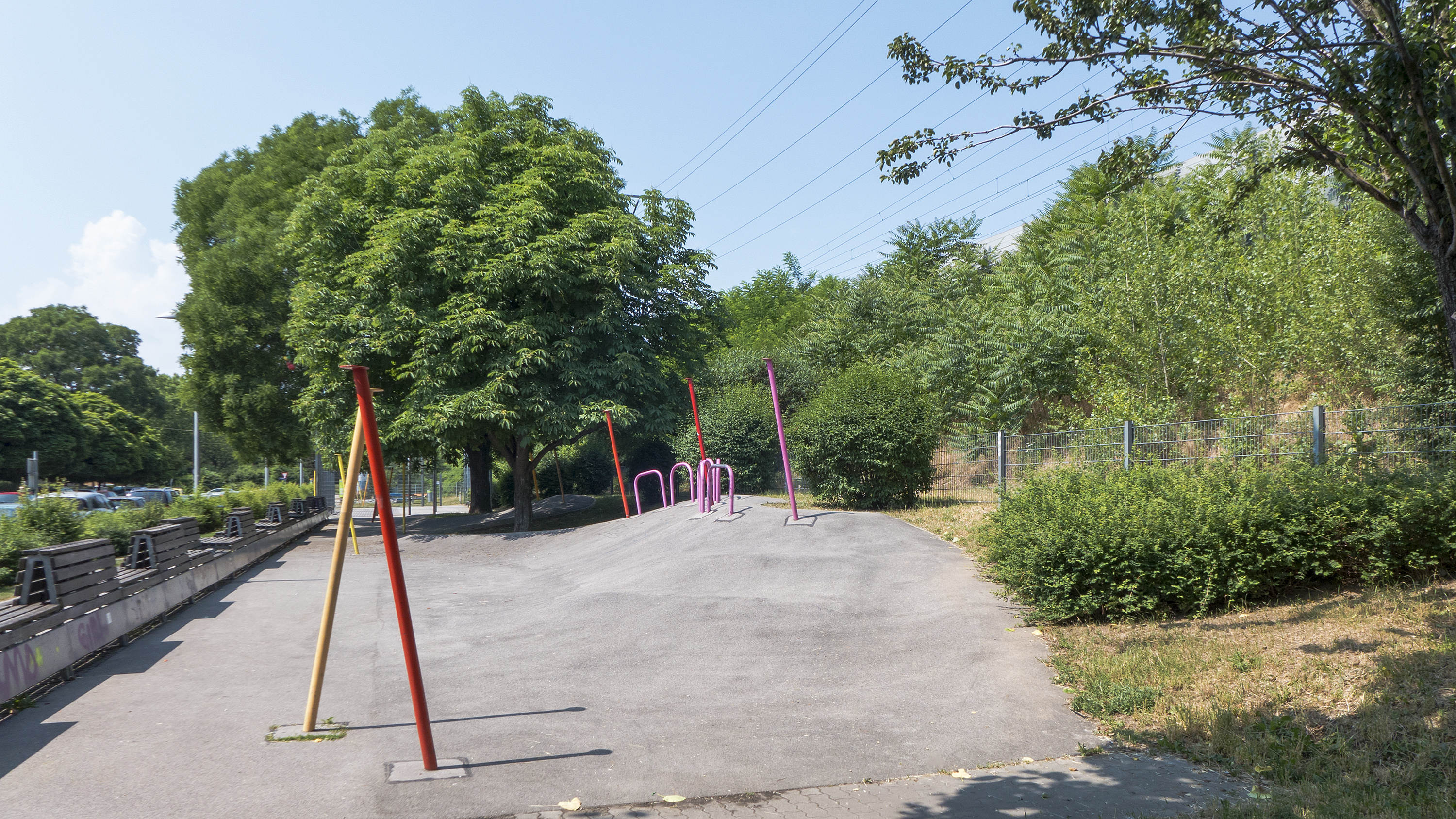 Haugerpark in Wien 11